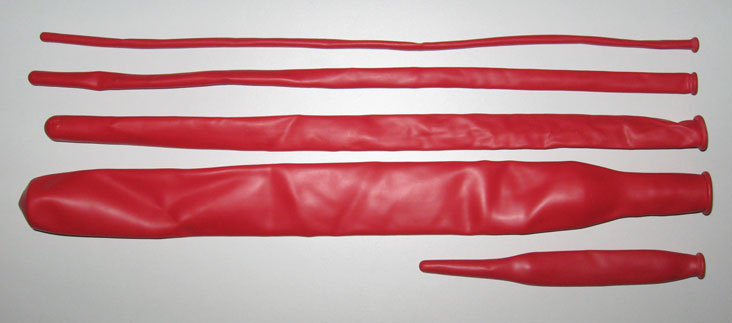 Divers tailles de ballons à modeler .